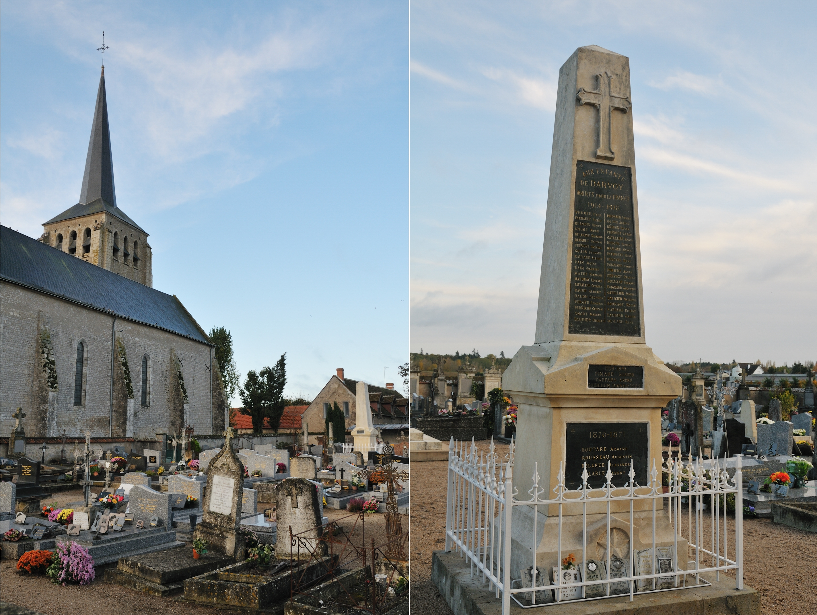 Assemblage de deux photos (église Saint-André et cimetière et monument aux morts et cimetière) de Darvoy, Loiret, France